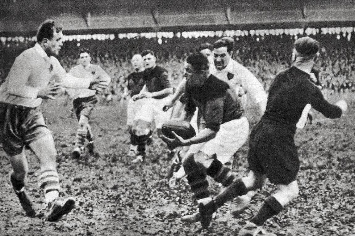 1936 (10 mai) Narbonne (en foncé) champion de France de rugby face à Clermond-Montferrand (en blanc), au Stade des Ponts-Jumeaux de Toulouse.